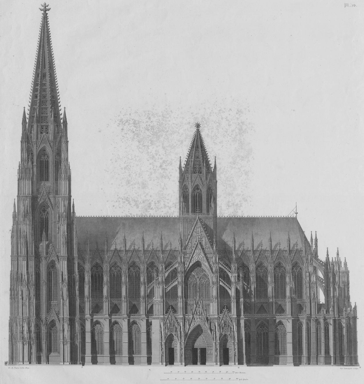 Christian Friedrich Traugott Duttenhofer: Der Längenaufriß [des Kölner Doms], Kupferstich nach einer Zeichnung von Maximilian Heinrich Fuchs, Elephant-Folio, 1819.